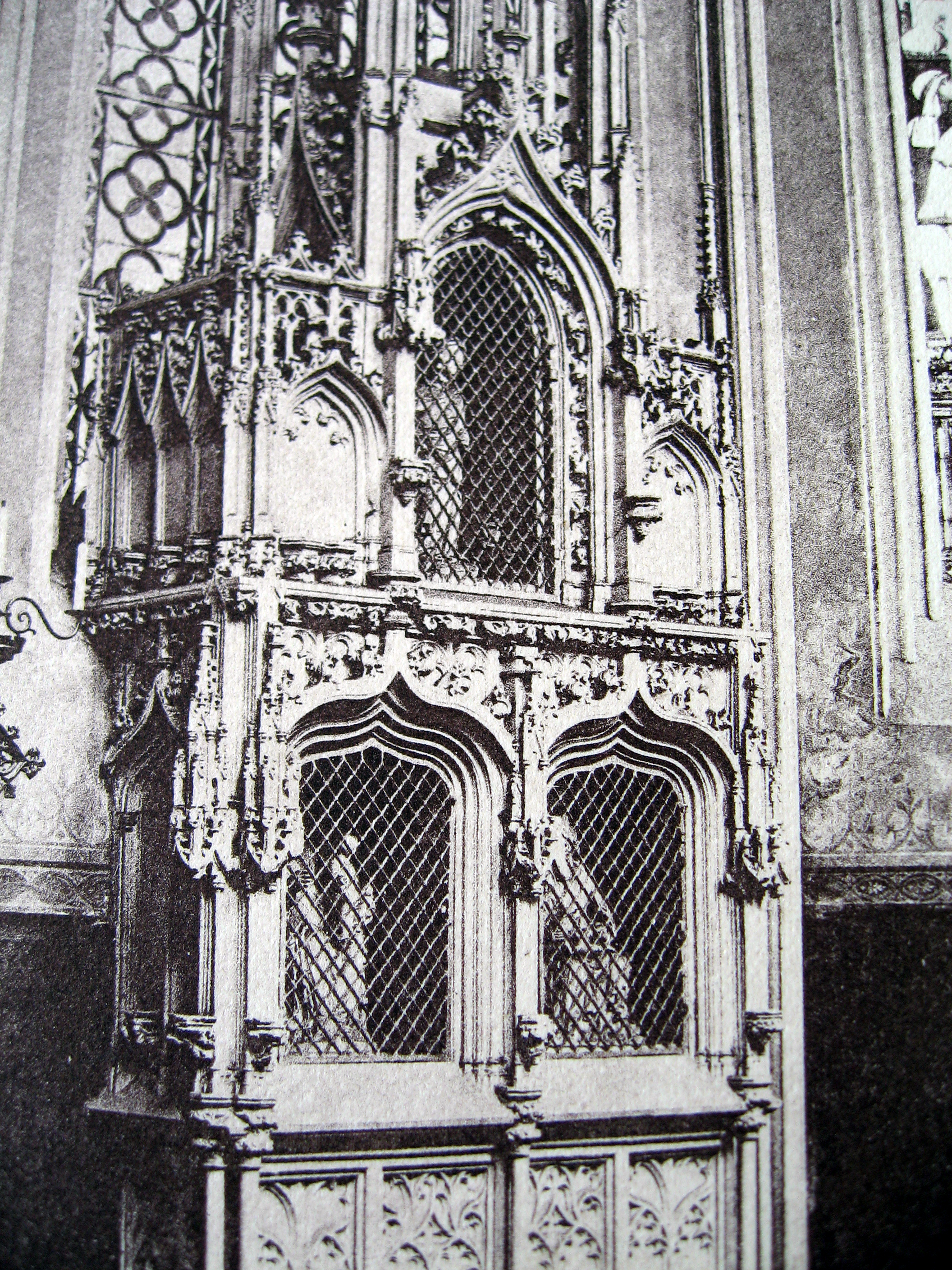 Dortmund, Marienkirche, Sakramentshaus 1894, Heiligenfiguren